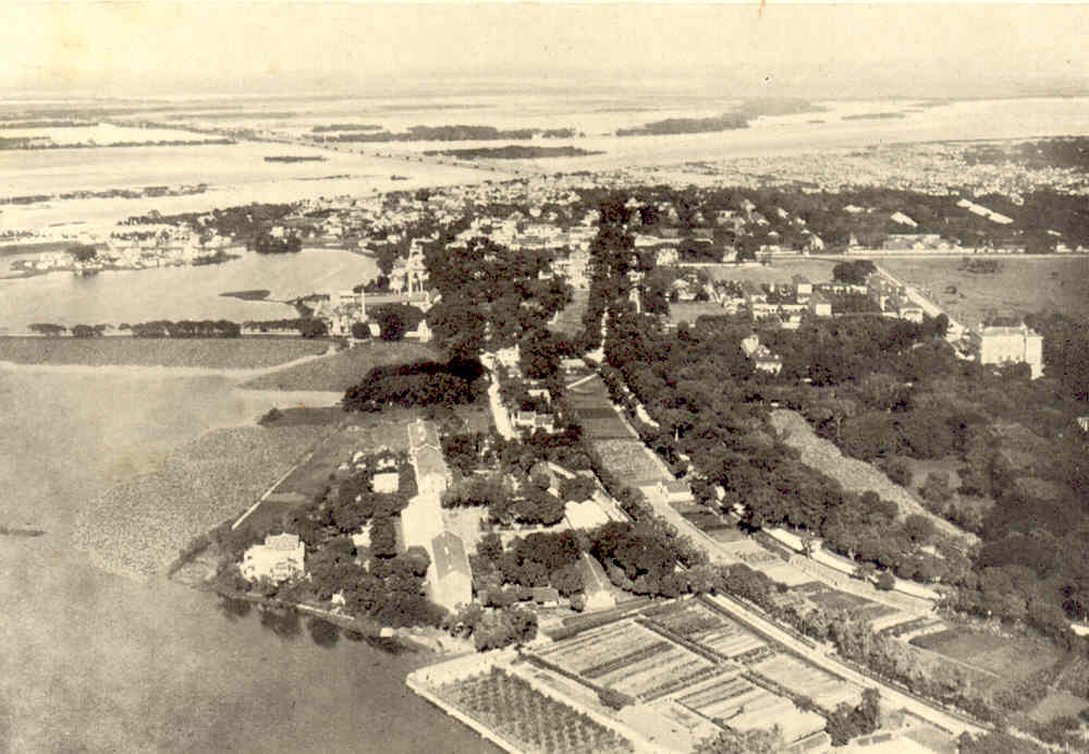 Trường Trung học Bảo hộ chụp từ trên không vào đầu thế kỉ 20 (góc dưới bên trái). Có thể thấy rõ 3 nhà học và Nhà Bát giác (còn có tên Biệt thự Schneider - Villa Schneider)